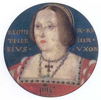 portrait miniature